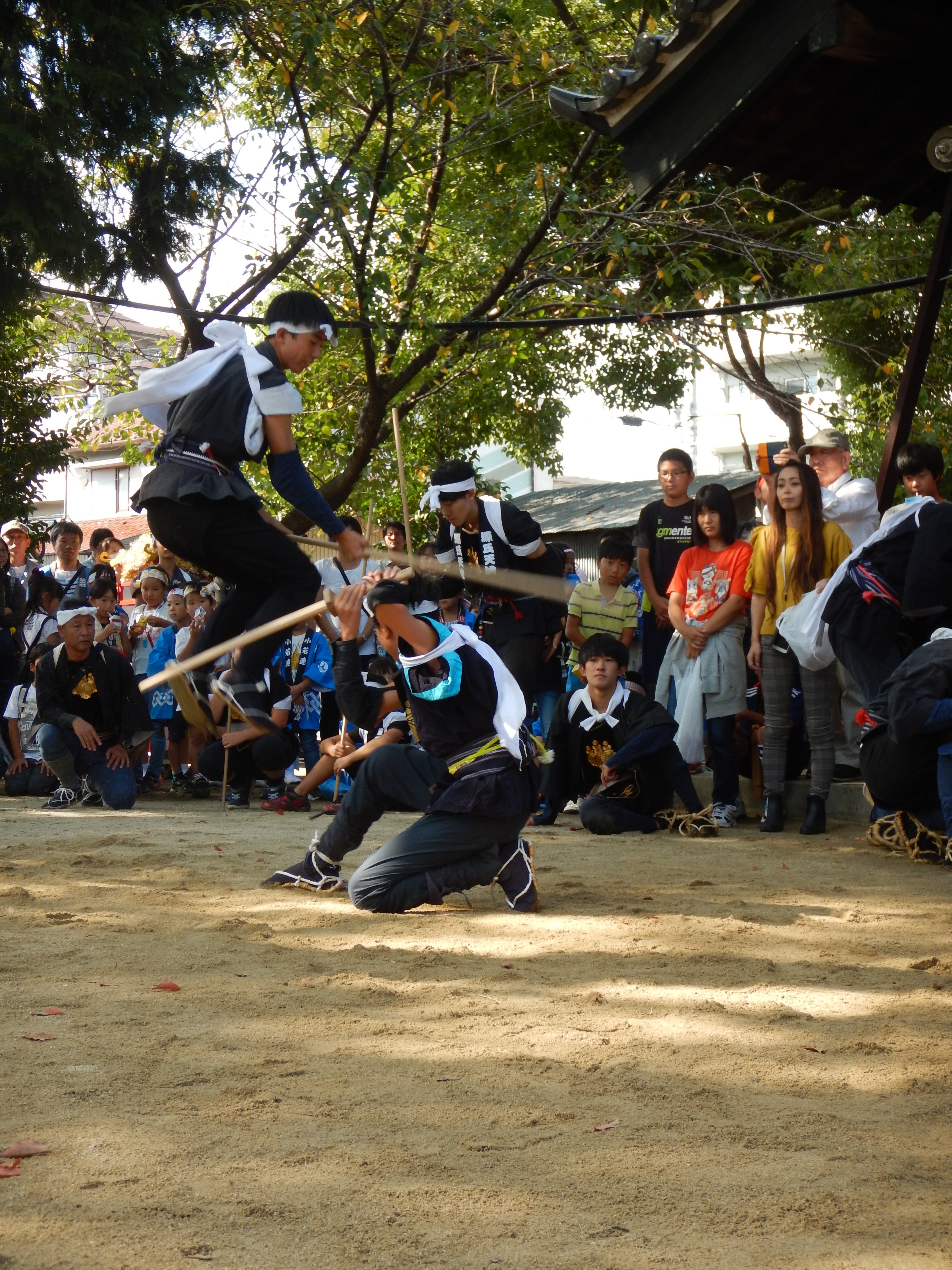 小木田の棒の手の演技の様子